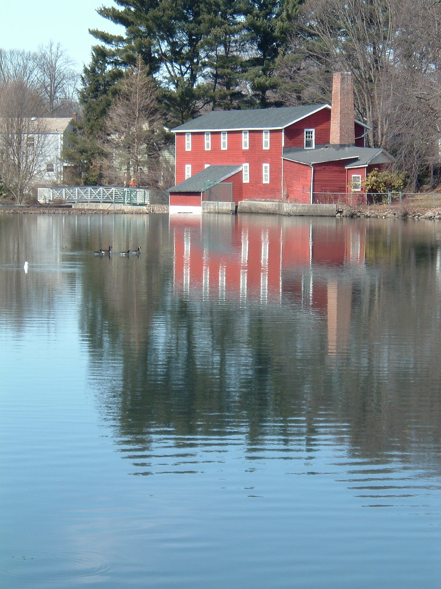 Cooper's Pond, Bergenfield NJ